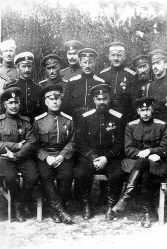 Белая емиграция в Болгарии. Сидят справа налево - генералы - Штейфон, Кутепов, Витковский. Стоят (за Кутеповым) генералы - Скоблин, Туркул. Болгария, 1921 год.